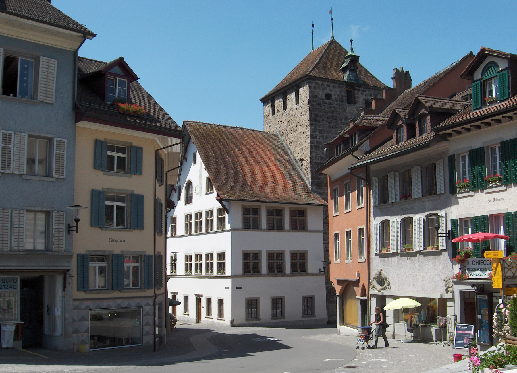 Brugg: Schwarzer Turm und Rathaus Fotografiert durch Voyager, 28. Juni 2006 Brugg: Black Tower and Old Town Hall Fotografiert durch Voyager, 28. Juni 2006